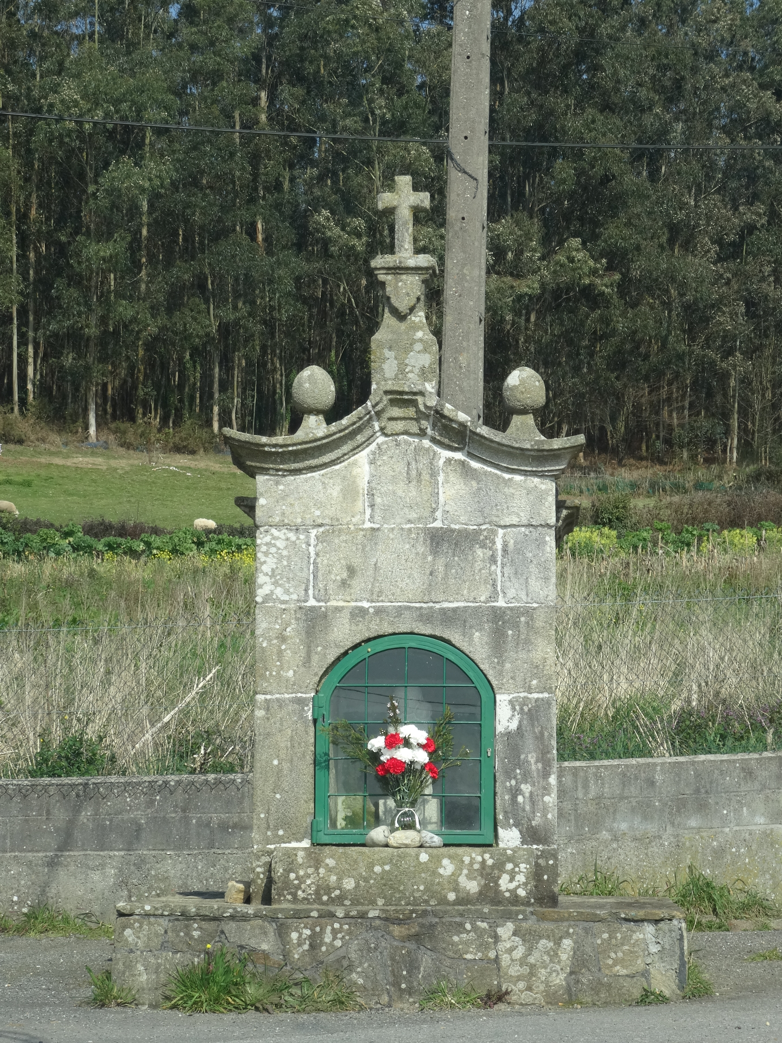 Peto de ánimas en Oza, Carballo.